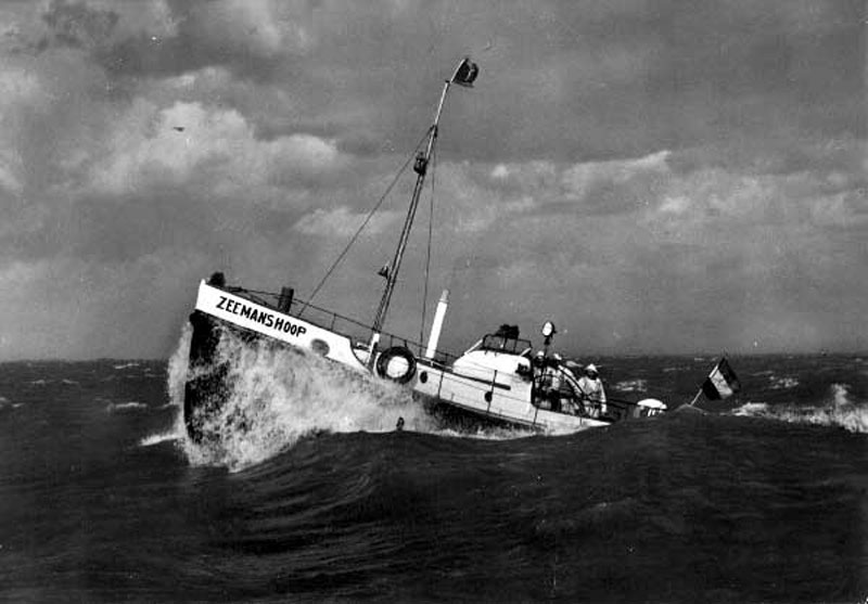 Zeemanshoop, reddingsboot, Scheveningen